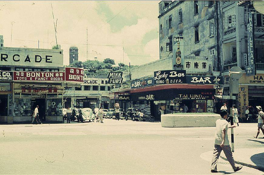 重慶市場為重慶大廈前身，於1920年代興建，1950年代末拆卸